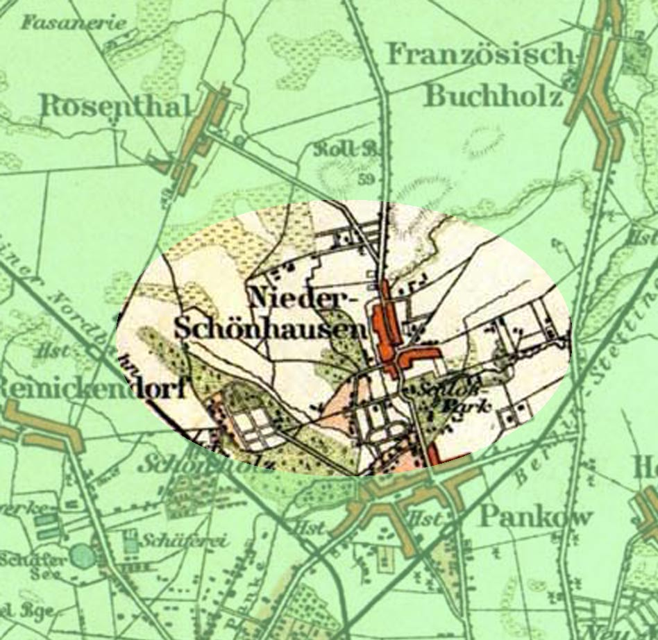 Lage dr Straßen in Niederschönhausen nach der Karte von 1894, unter Nutzer einer Karte aus Meyers Lexikon.